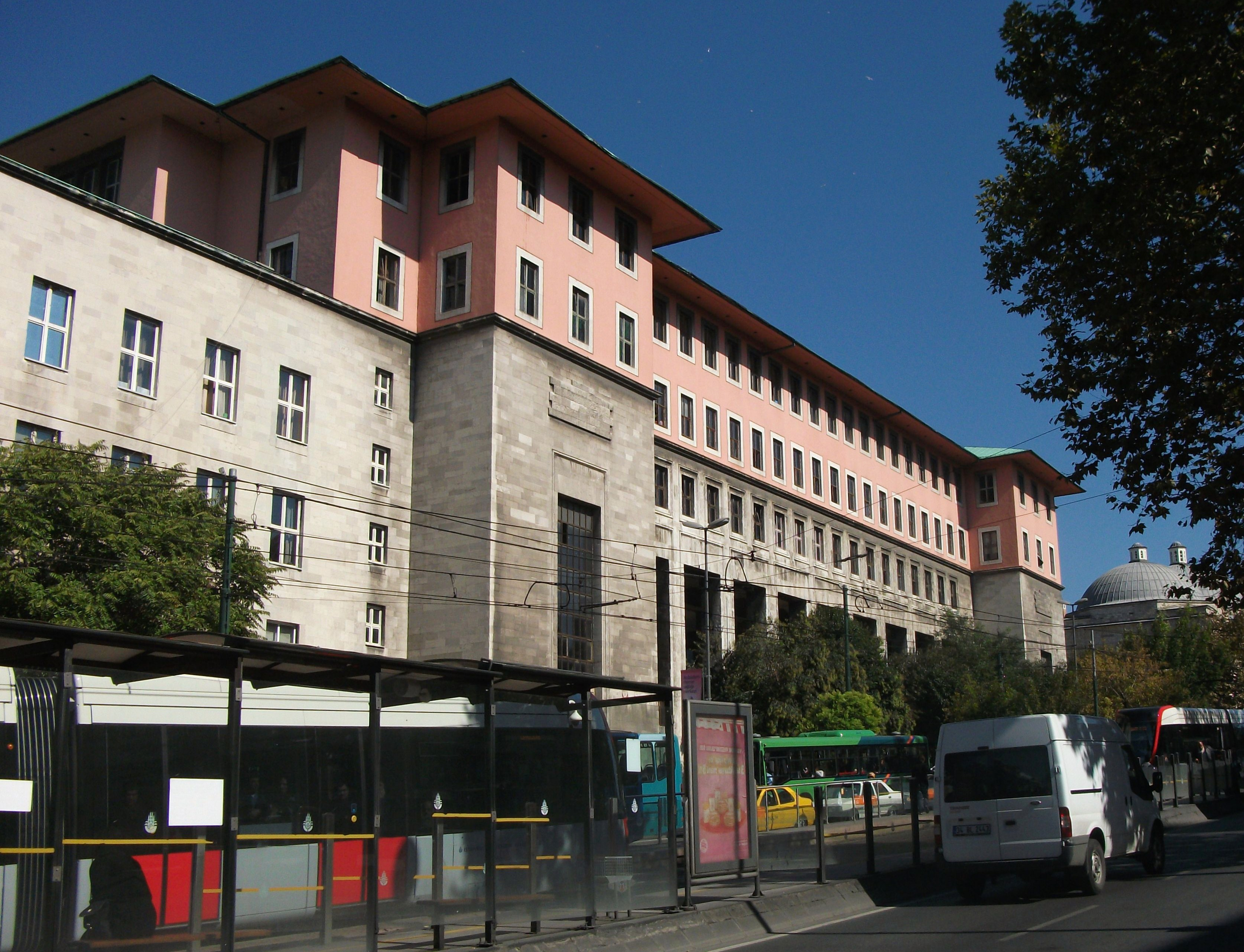 "Türk mimarlar Sedad Hakkı Eldem ve Emin Onat tarafından tasarlanan ve 1942-43 yılları arasında İstanbul'un Laleli ile Beyazıt semtleri arasında inşa edilen İstanbul Üniversitesi Edebiyat Fakültesi binası."